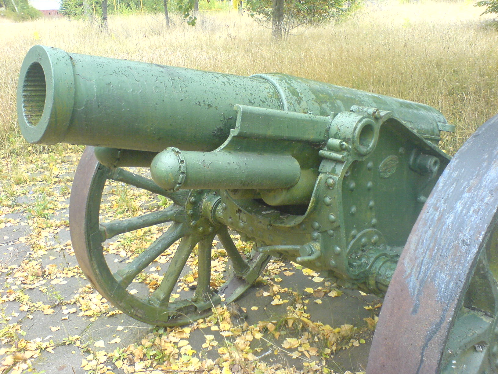 Cannon Schneider 1903.